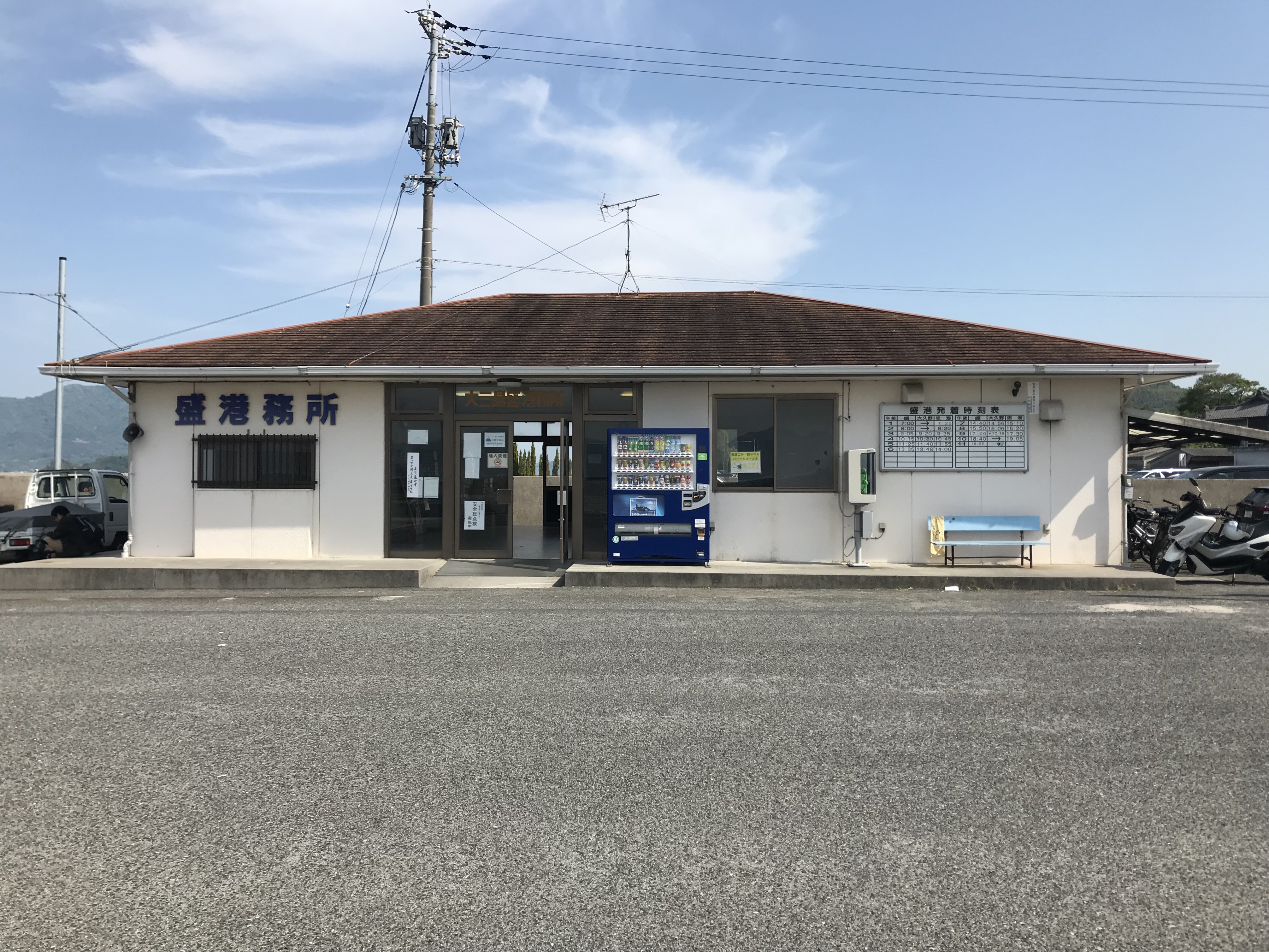 盛港務所